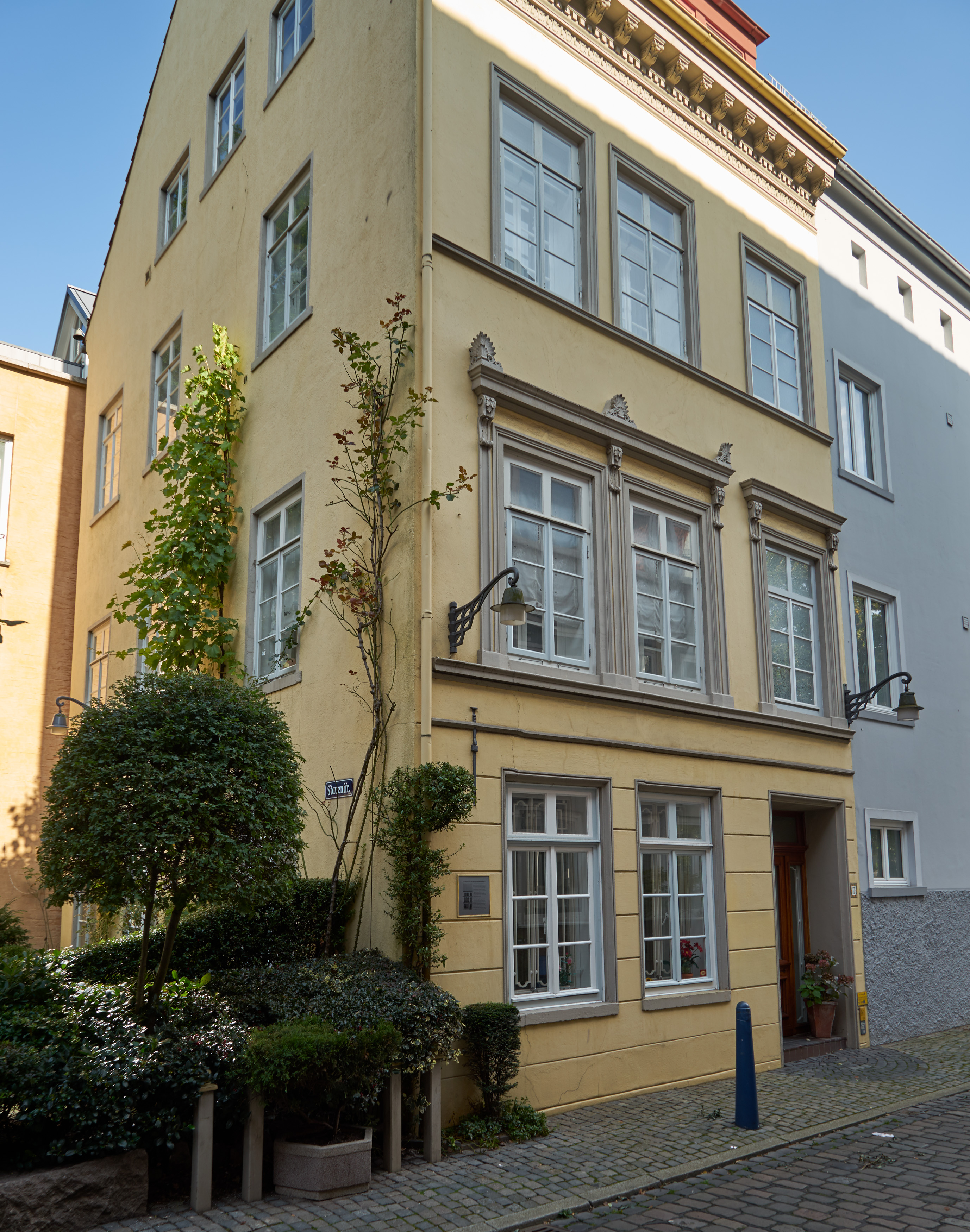 Wohnhaus in Bremen, Stavenstraße 7Das abgebildete Objekt ist ein geschütztes Kulturdenkmal in der Freien Hansestadt Bremen, mit der Nr. 1169 beim Landesamt für Denkmalpflege registriert.